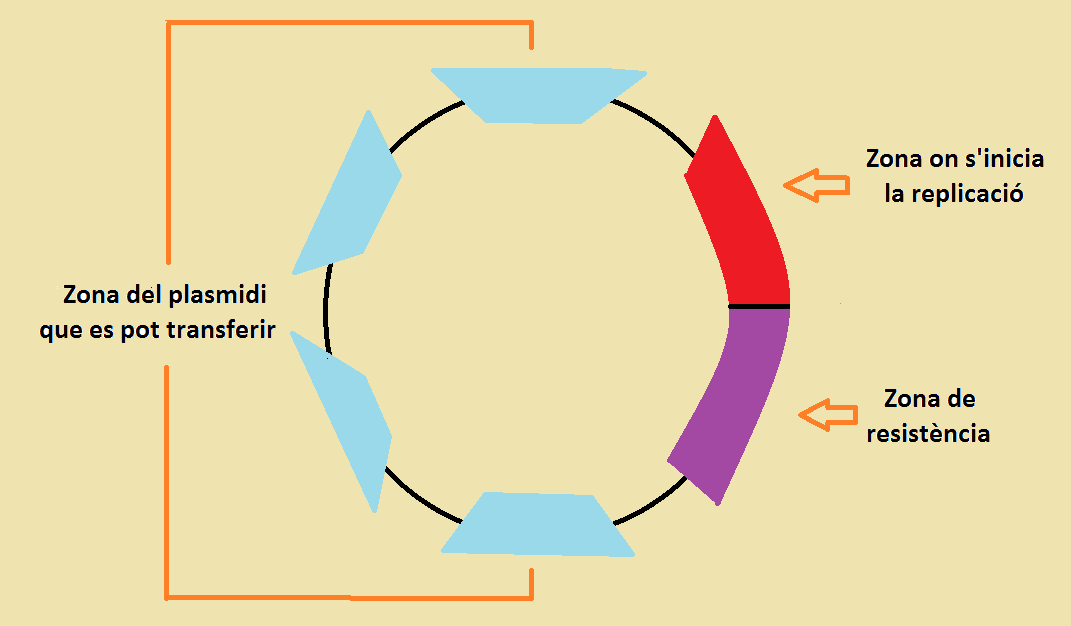 Com és l'estructura